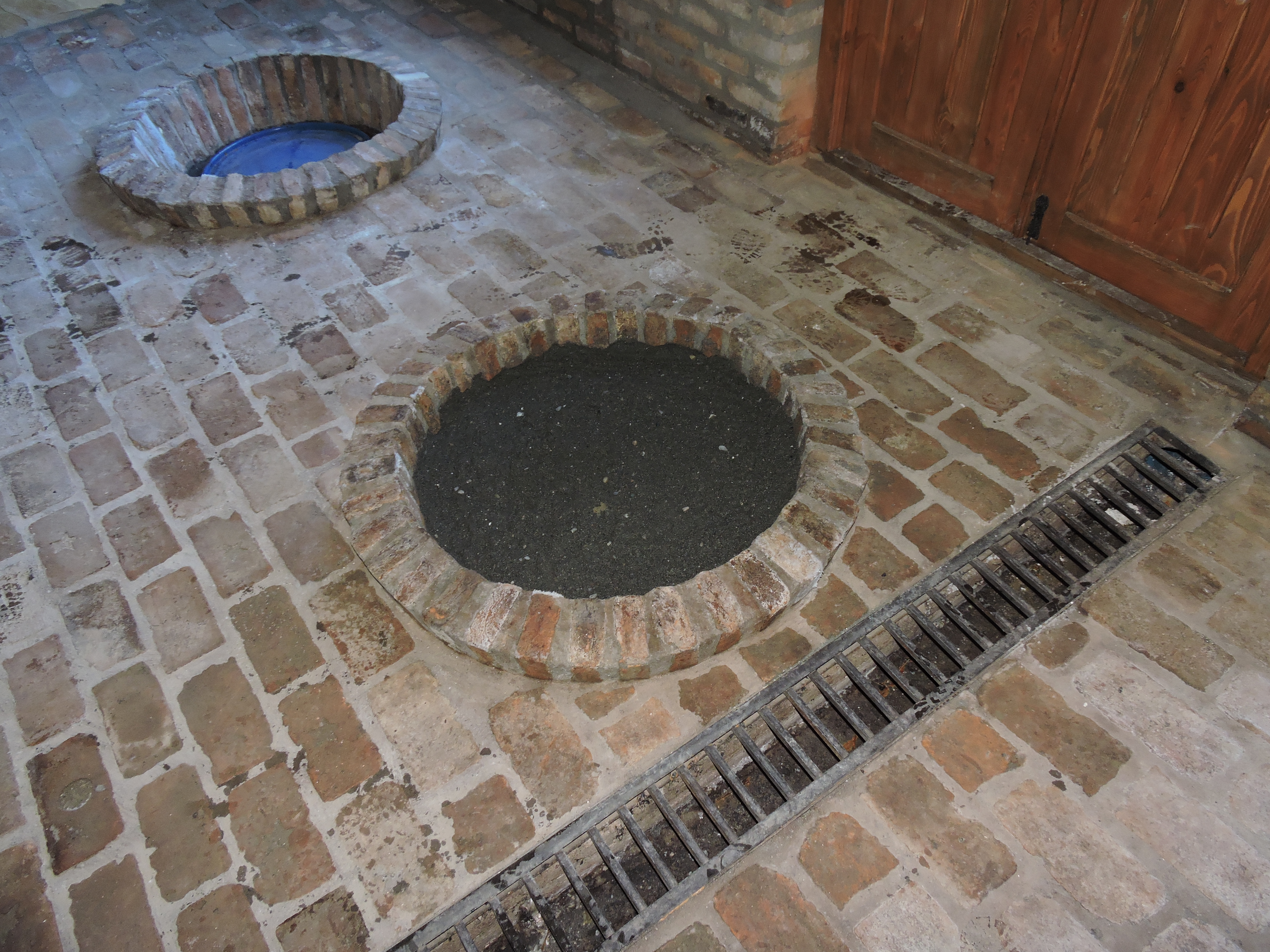 Квеври.